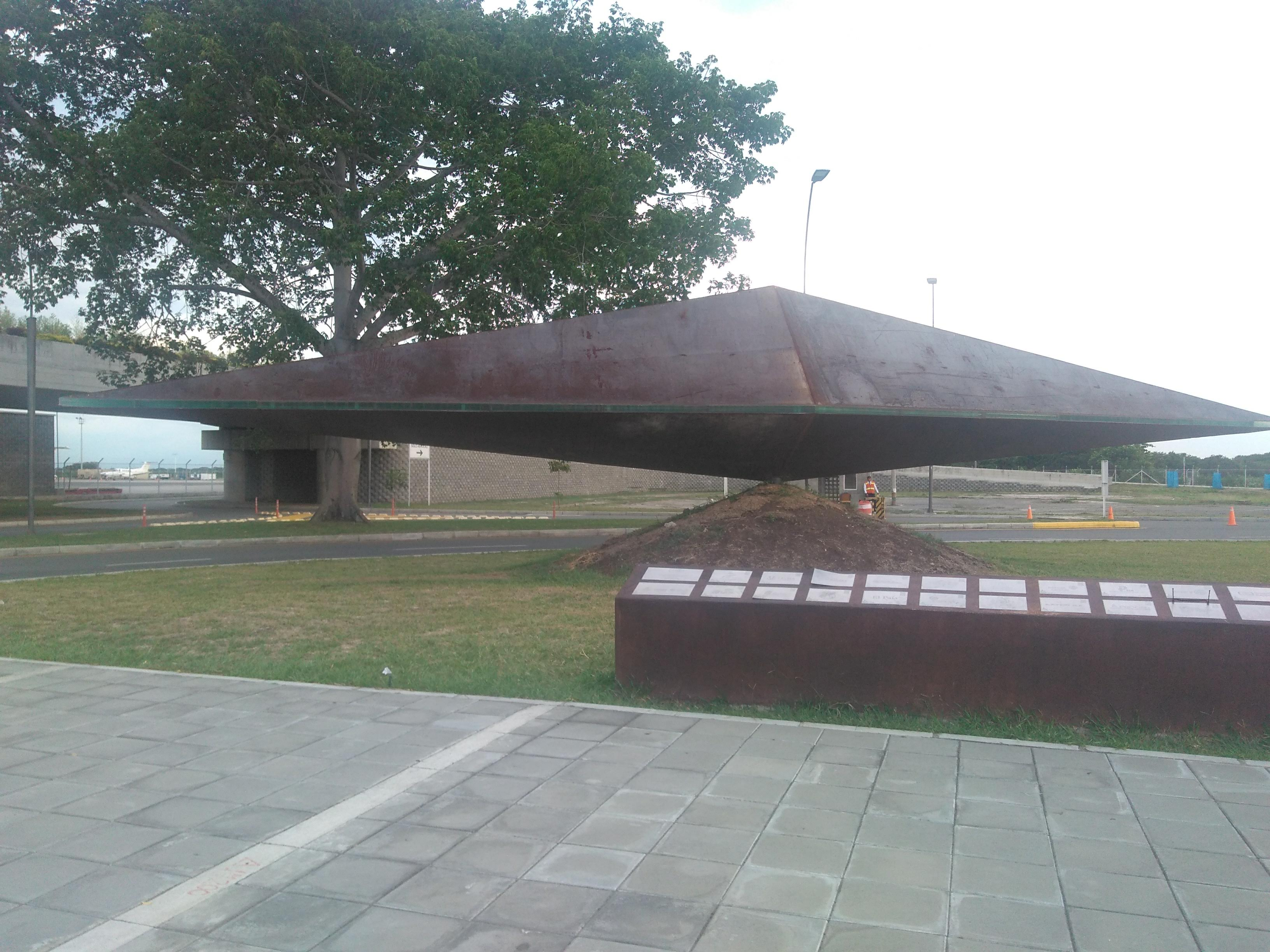 Monumento en el Aeropuerto de Cali Esta fotografía fue tomada en el municipio colombiano con código 76520.